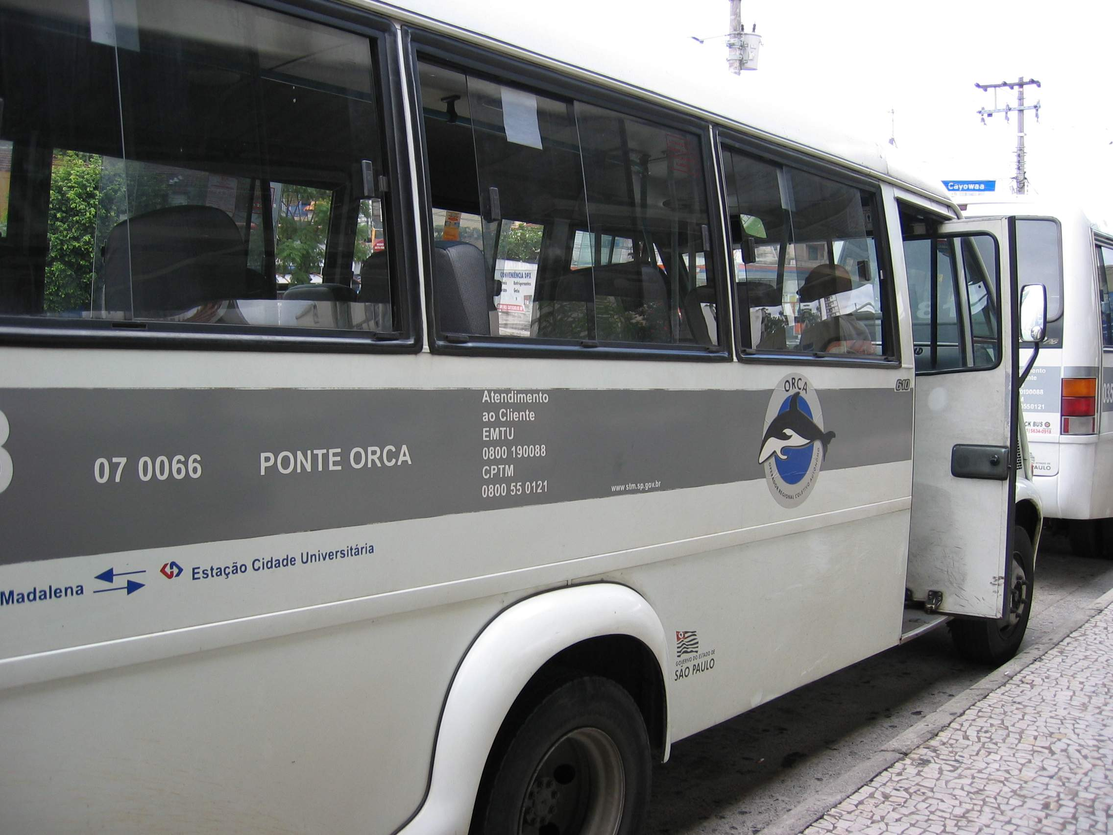 Foto tirada no terminal da Ponte Orca CPTM-Metrô por mim.